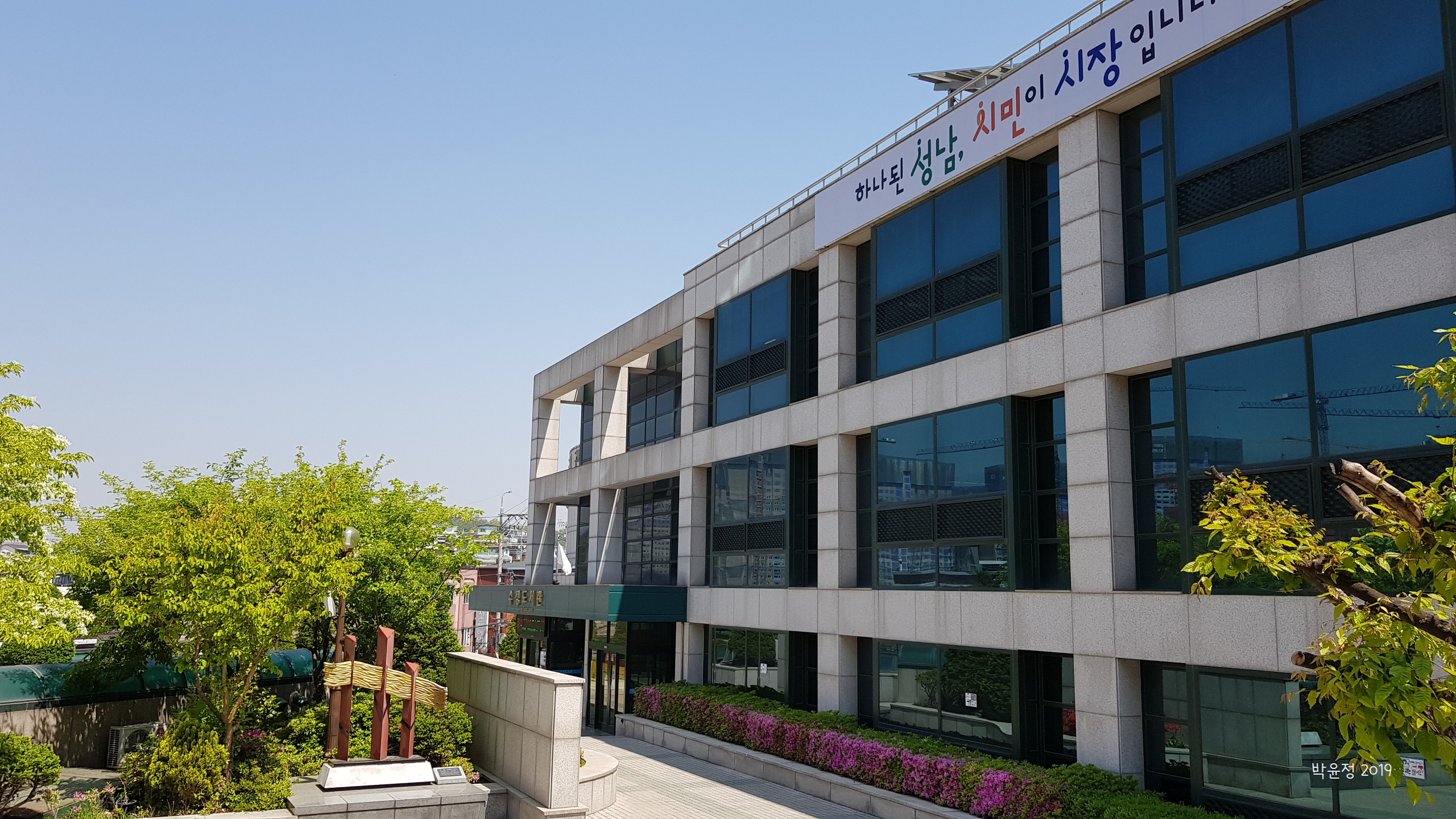 성남시수정도서관 2019년 봄 전경사진